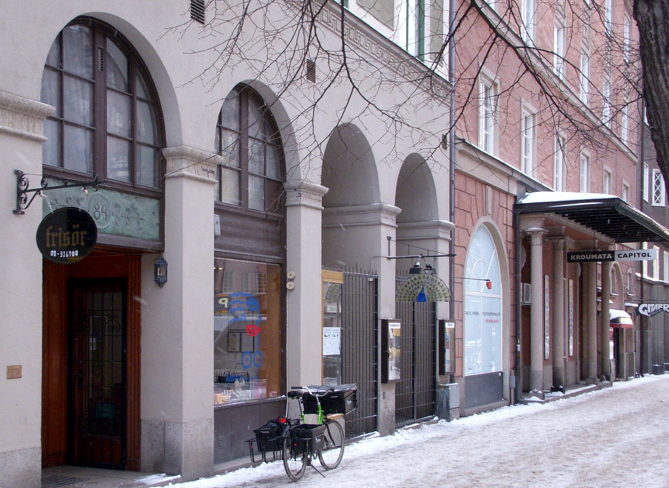 Före detta biograf "Påfågeln" (senare Ri-tvåan), S:t Eriksgatan 84, Capitol syns i bakgrunden